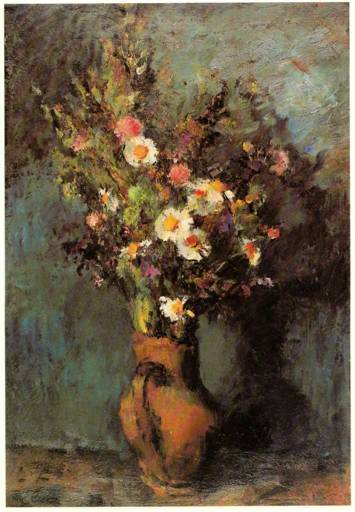 Feldblumen auf Blautitle QS:P1476,de:"Feldblumen auf Blau" label QS:Lde,"Feldblumen auf Blau"